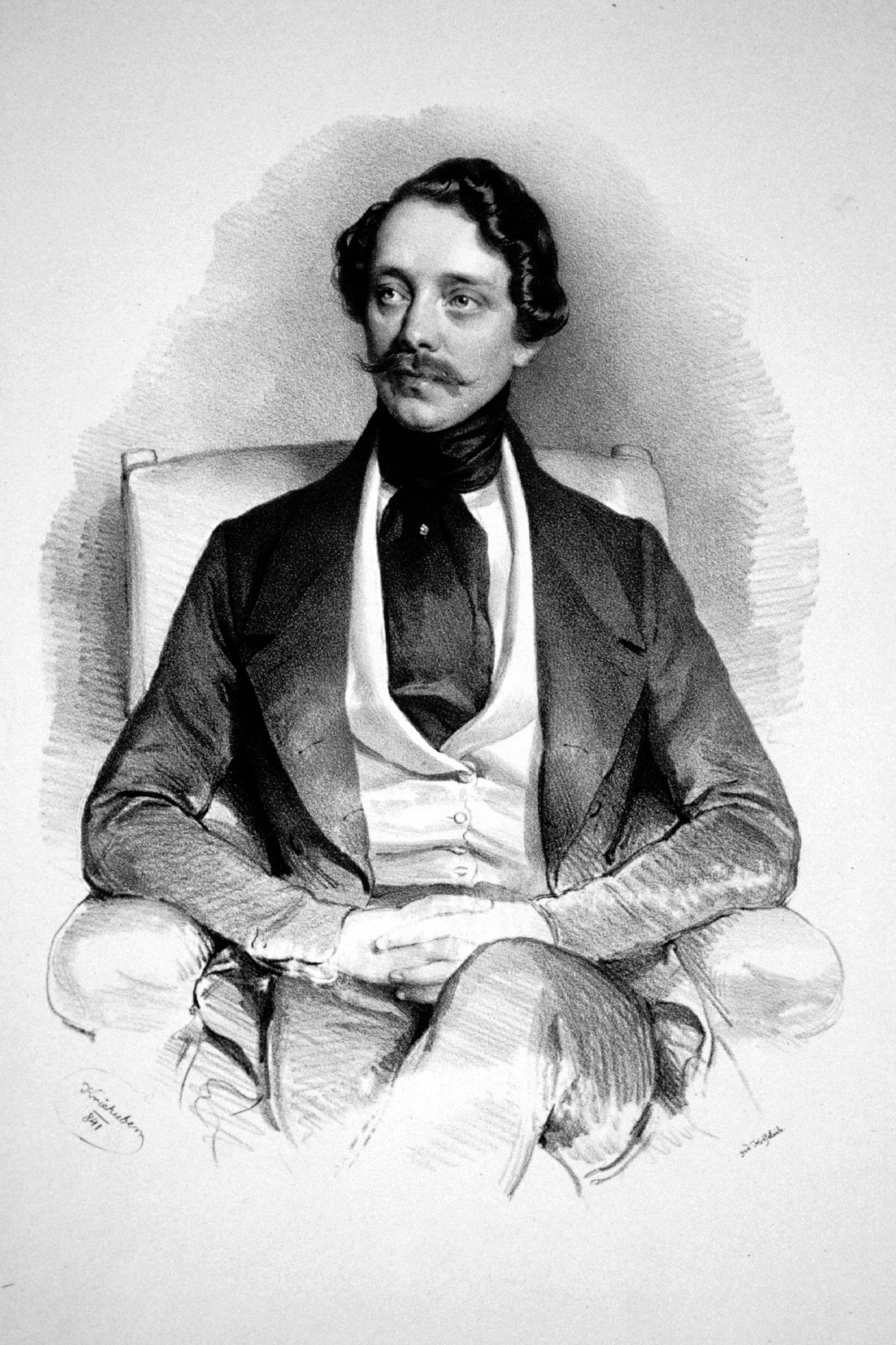 Carl Freiherr von Schönstein (1797-1876), Ministerialrat und erster Schubertsänger (Bariton). Lithographie von Josef Kriehuber, 1841